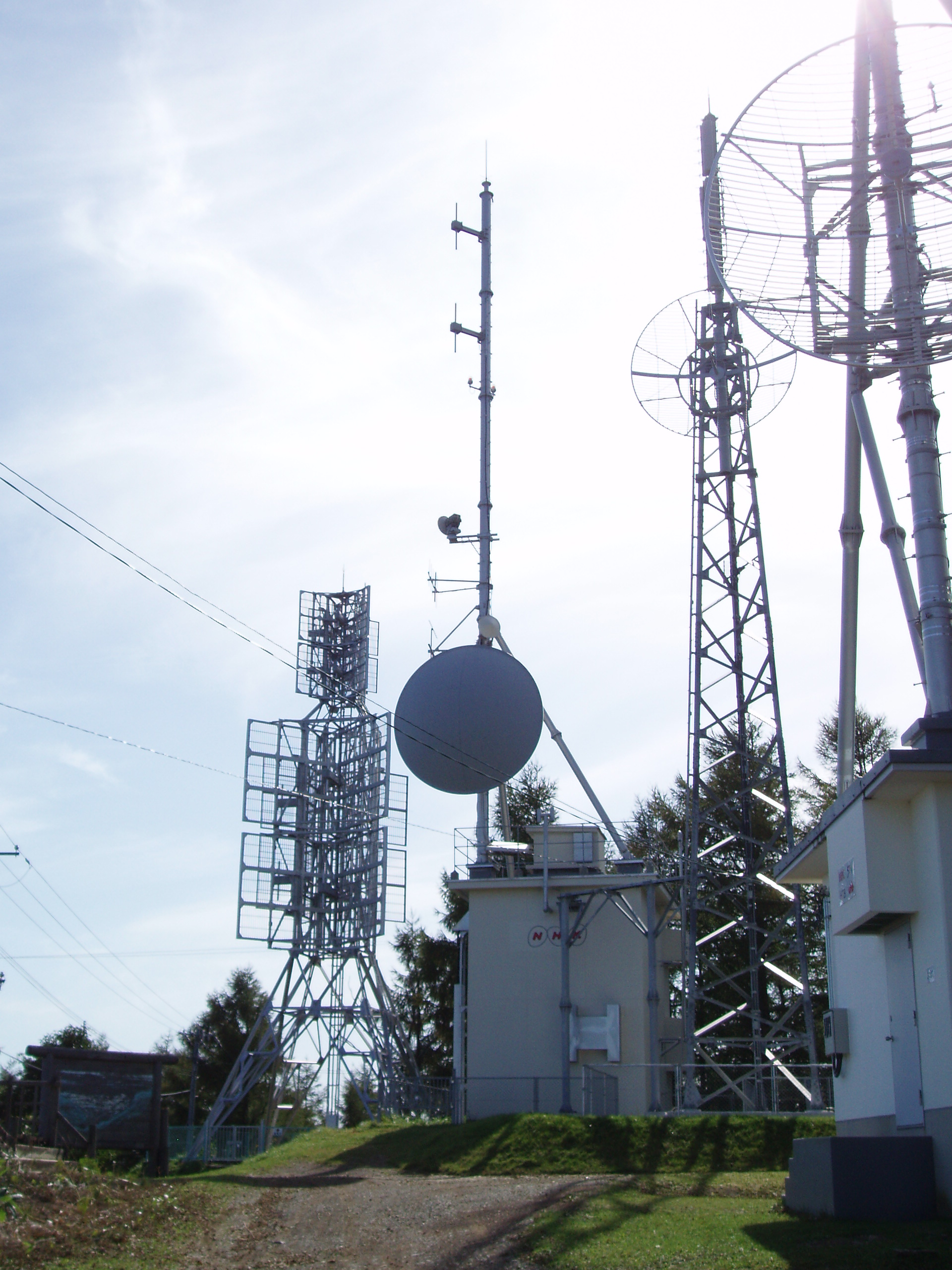 広尾中継局（NHK）デジタル設備増設後